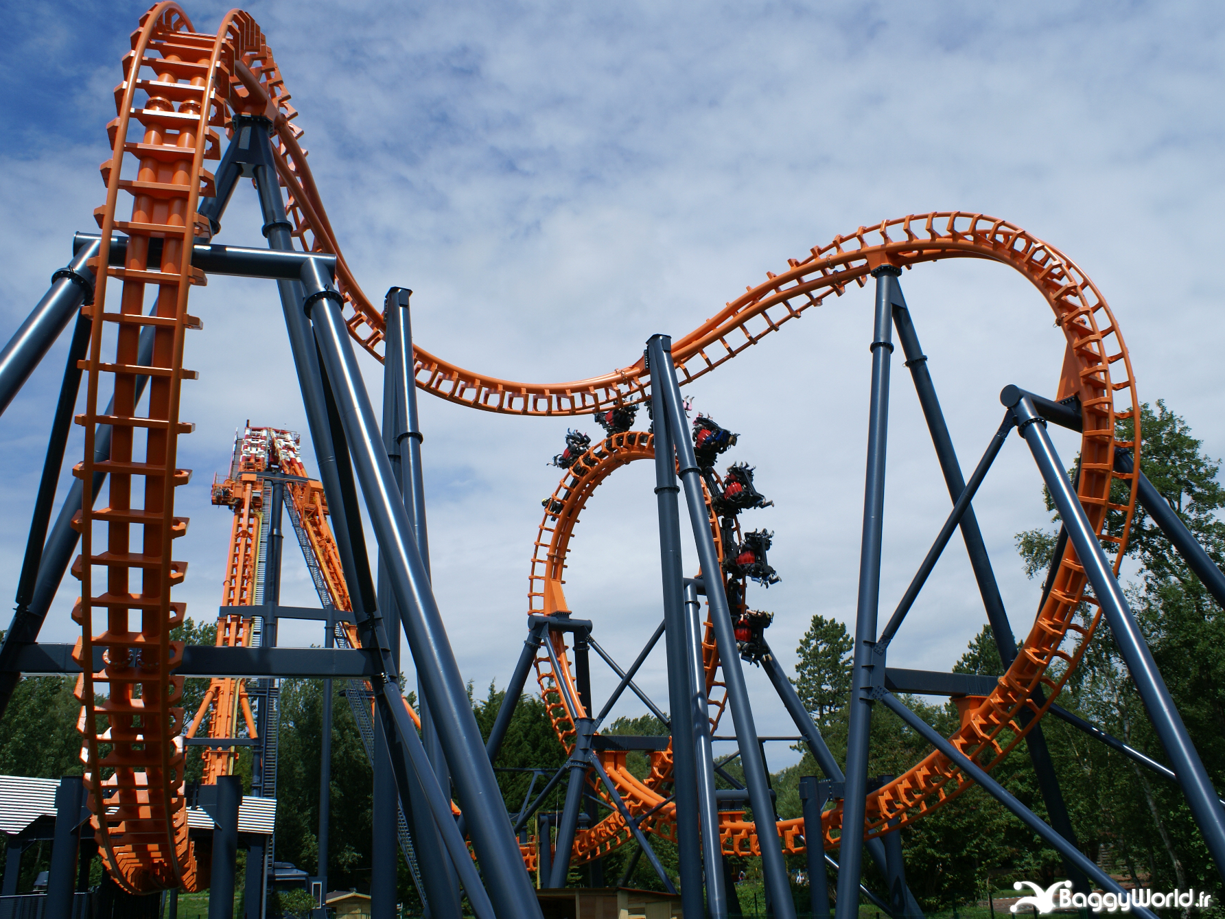 Triops, Montagne Russe au Parc Bagatelle de Merlimont (Entre Berck et le Touquet)-Modèle Invertigo du constructeur Vekoma.